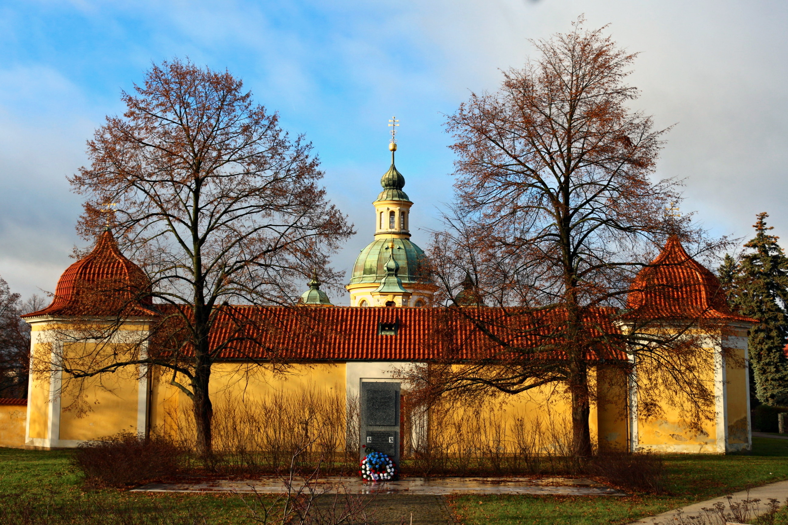 Kostel Panny Marie Vítězné na Bílé Hoře